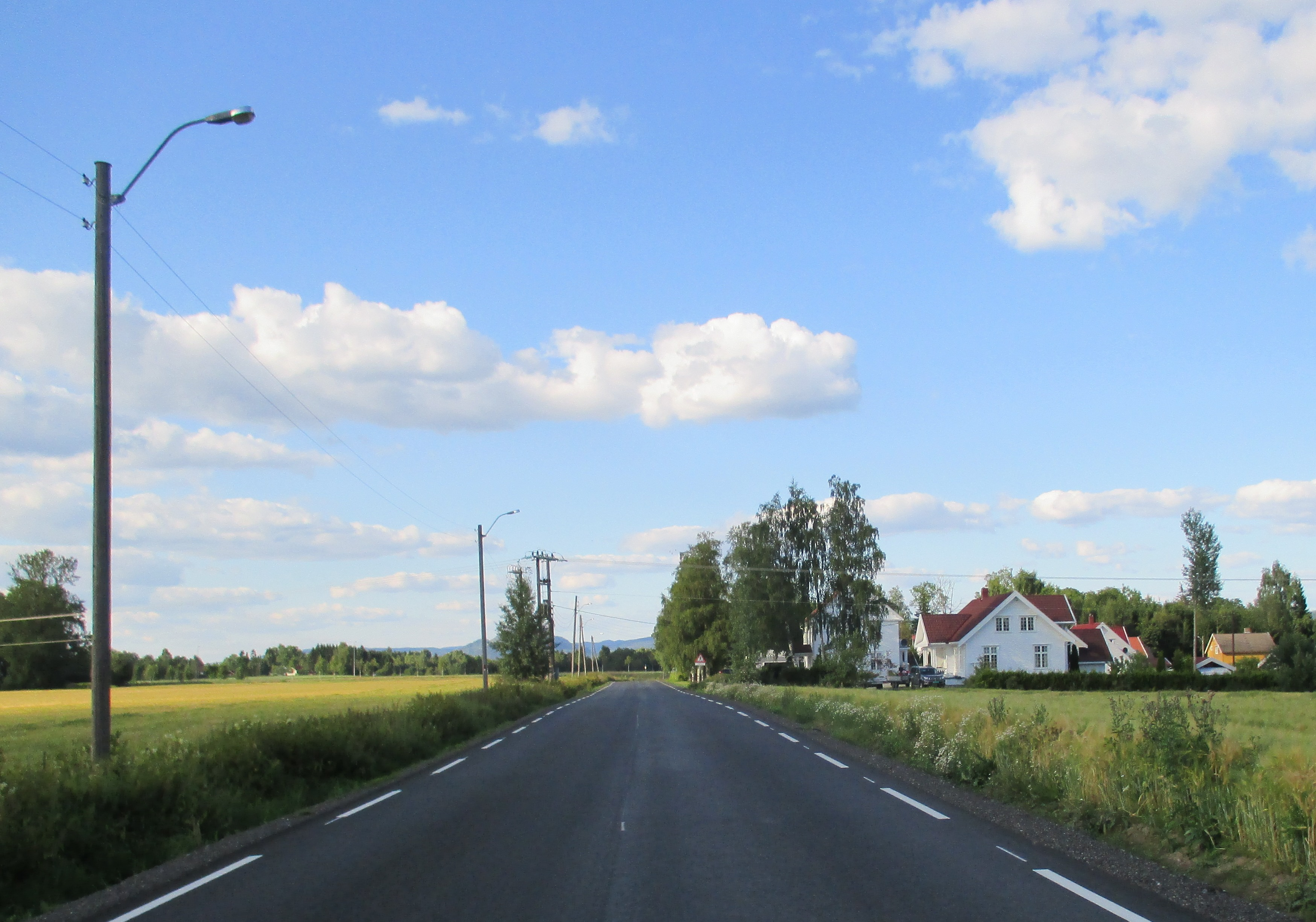 Fylkesvei 506 nord for Nygård (Bøn) i Eidsvoll